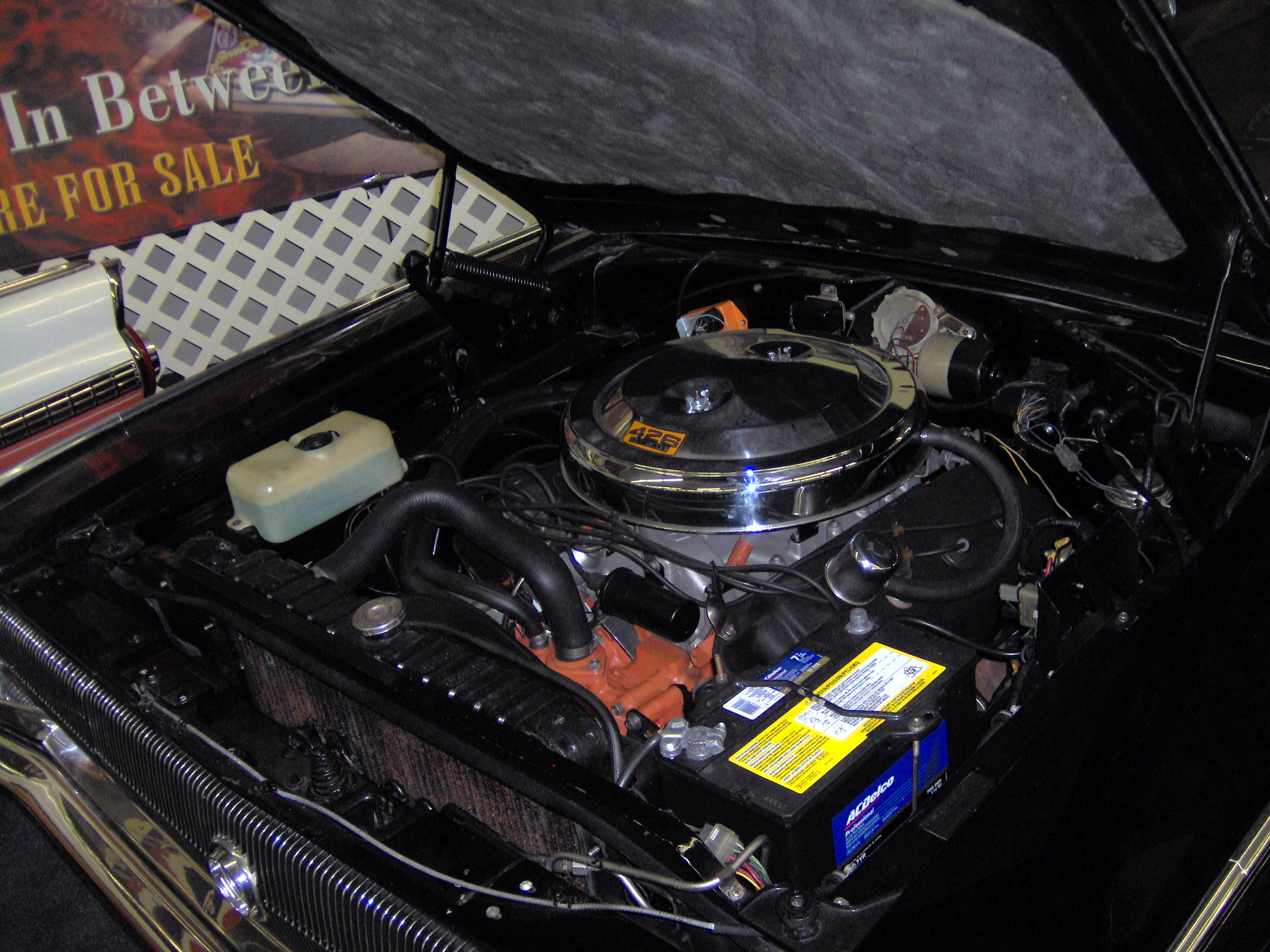 1966 Dodge Charger 426 Hemi